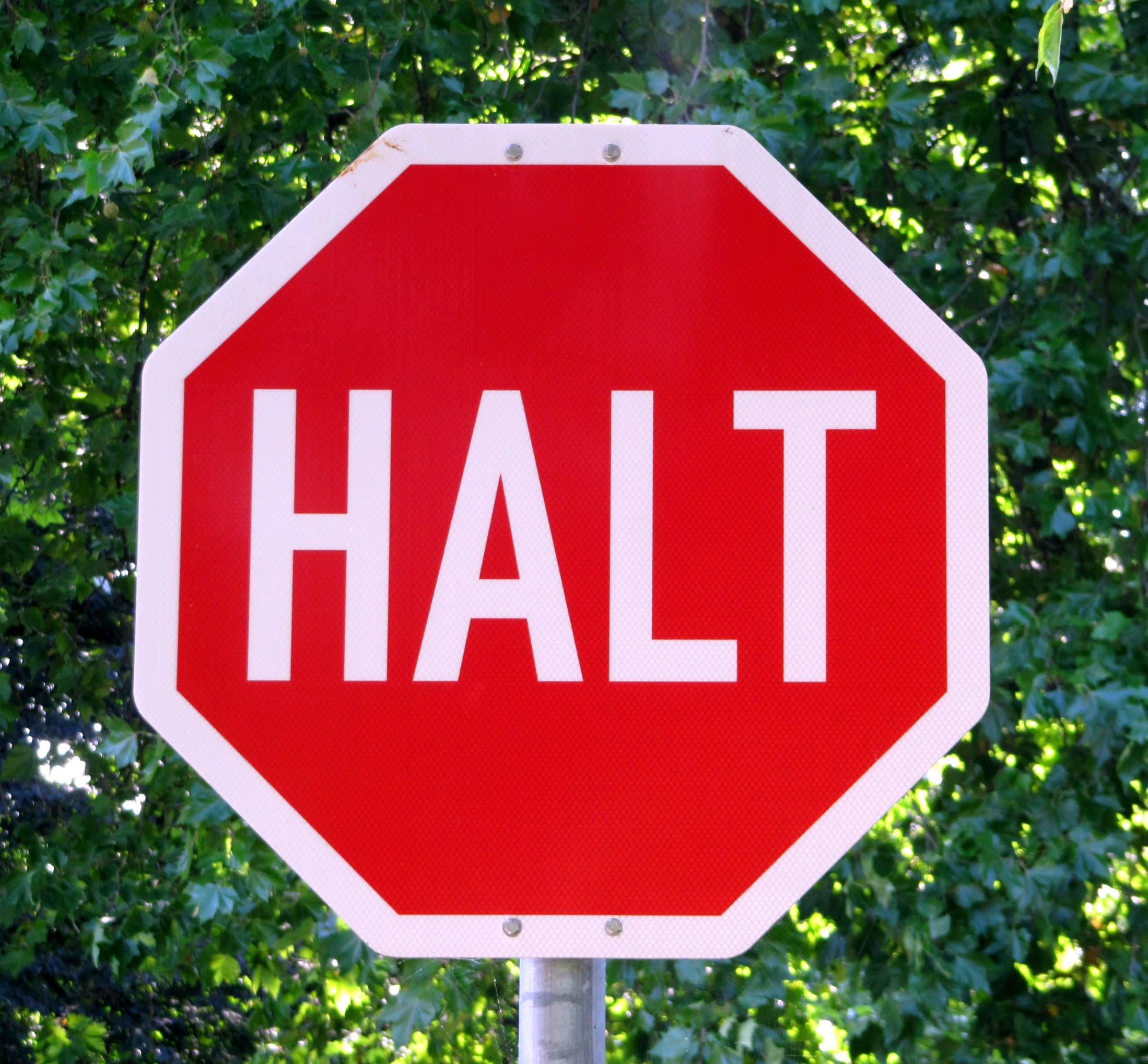 Alsterpark Hamburg (2016)